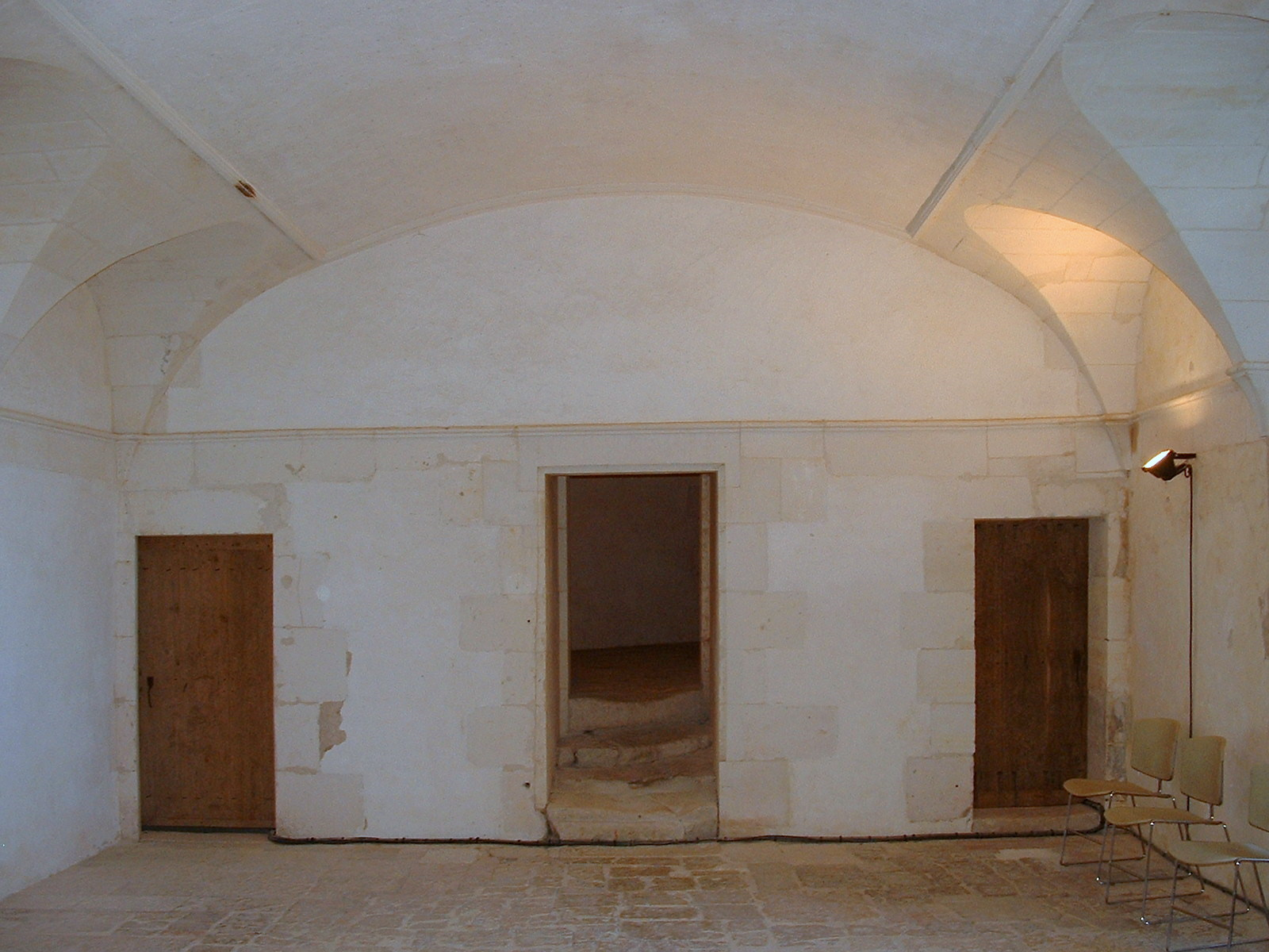 Château de Maulnes, Cruzy-le-Châtel, Yonne